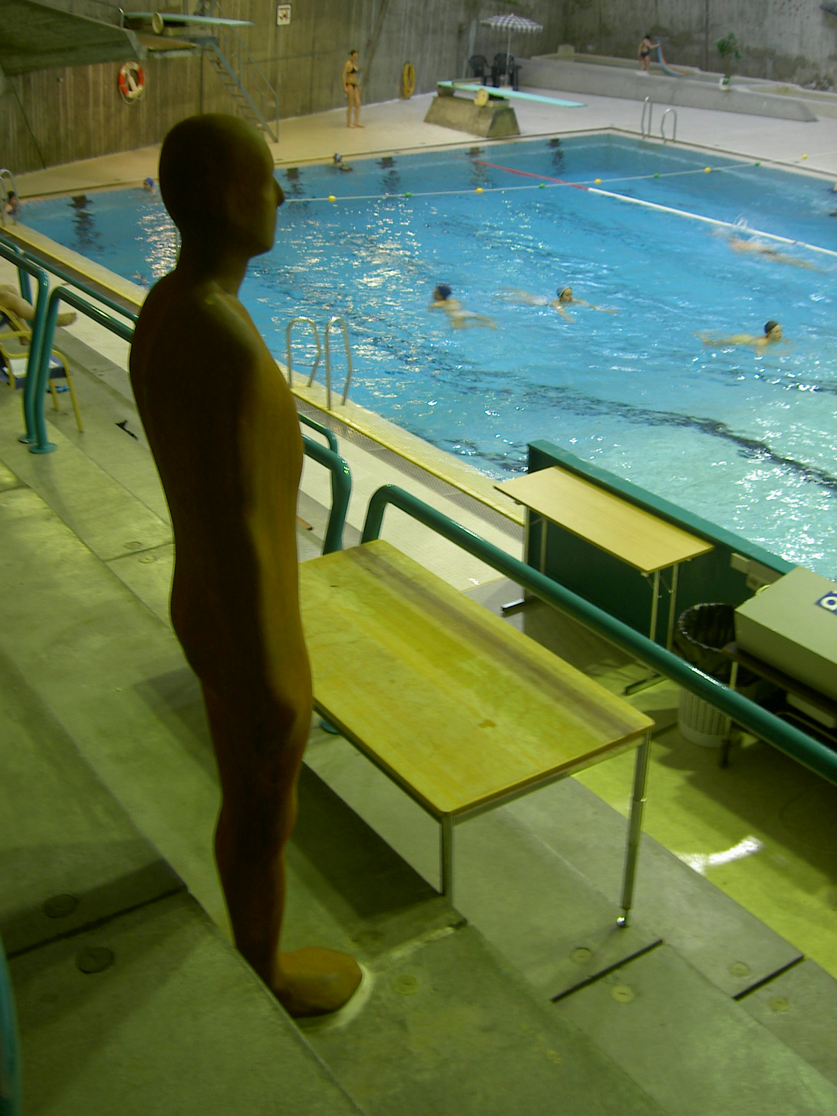 In Stavanger Swimminghall